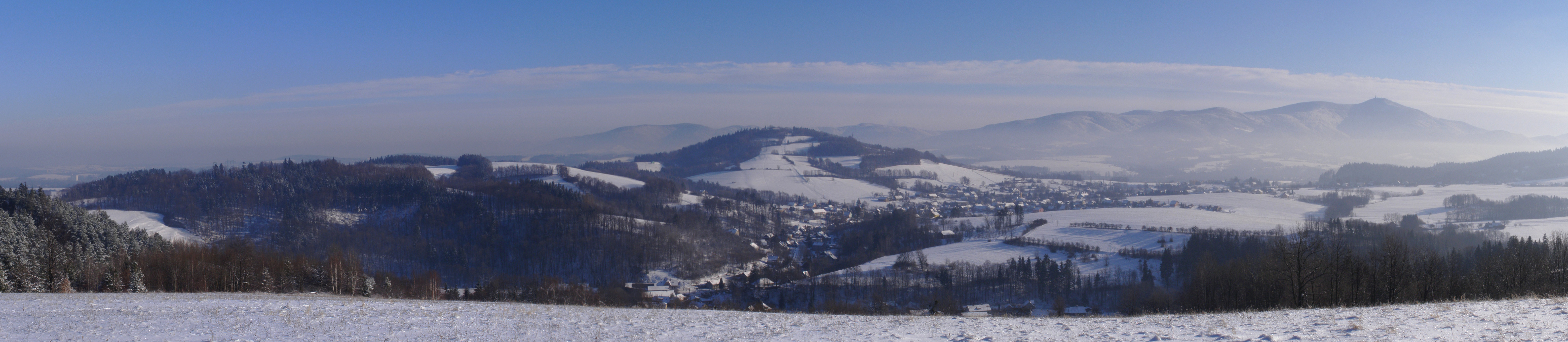 Česky: Metylovická pahorkatina, panoramatický výhled z vrcholu Na Magoni (497 m) od severovýchodu na jihovýchod: vlevo vrcholy Na horách (453 m), Lišky (457 m), uprostřed Metylovická hůrka (524 m), pod Metylovickou hůrkou napravo obec Metylovice, vpravo vrchol Na kopci (412 m) a za ním zcela vzadu Lysohorská rozsocha s nejvyšším vrcholem Lysá hora (1323 m)